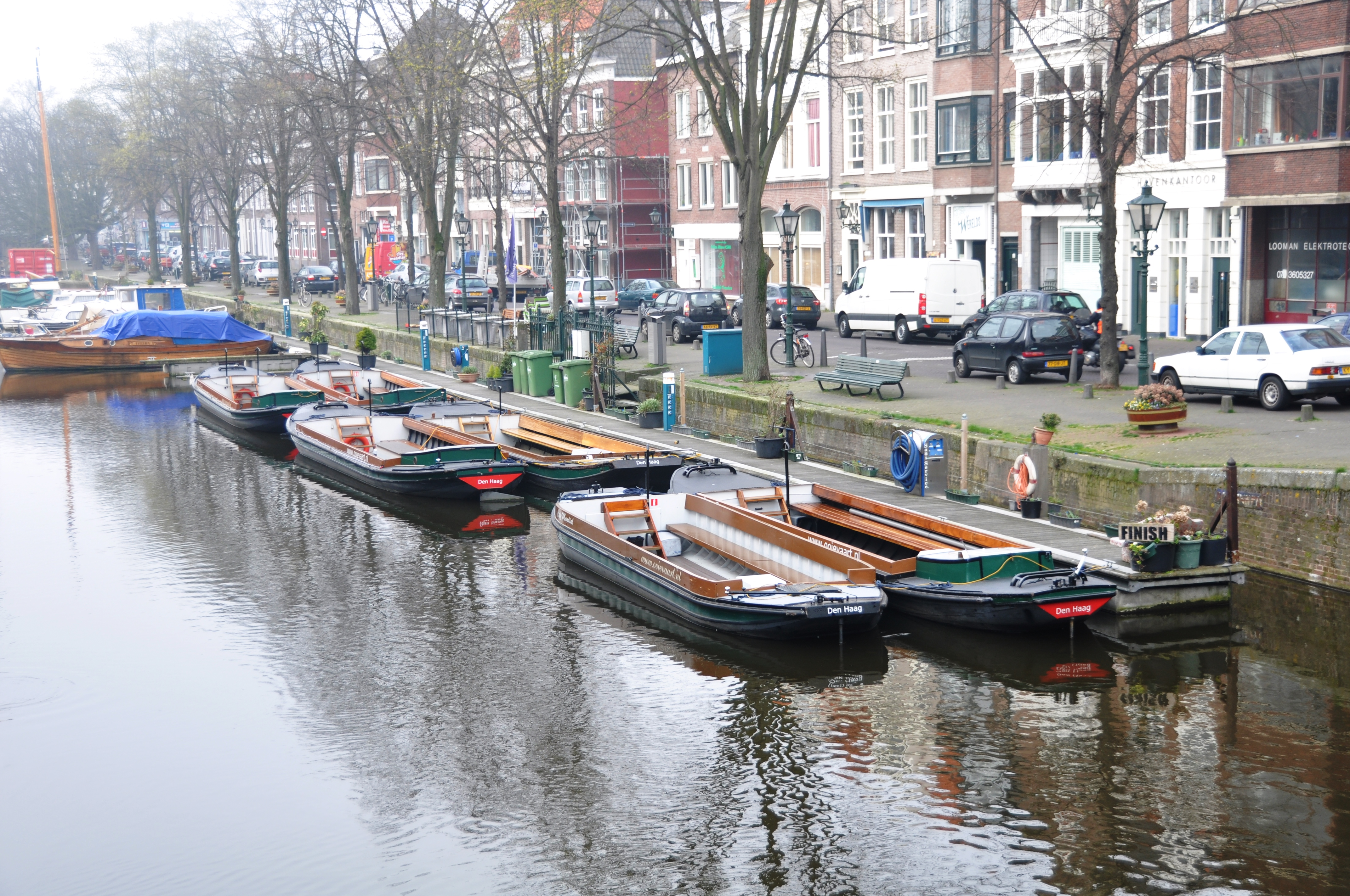 De vloot van de Ooievaart, Den Haag.